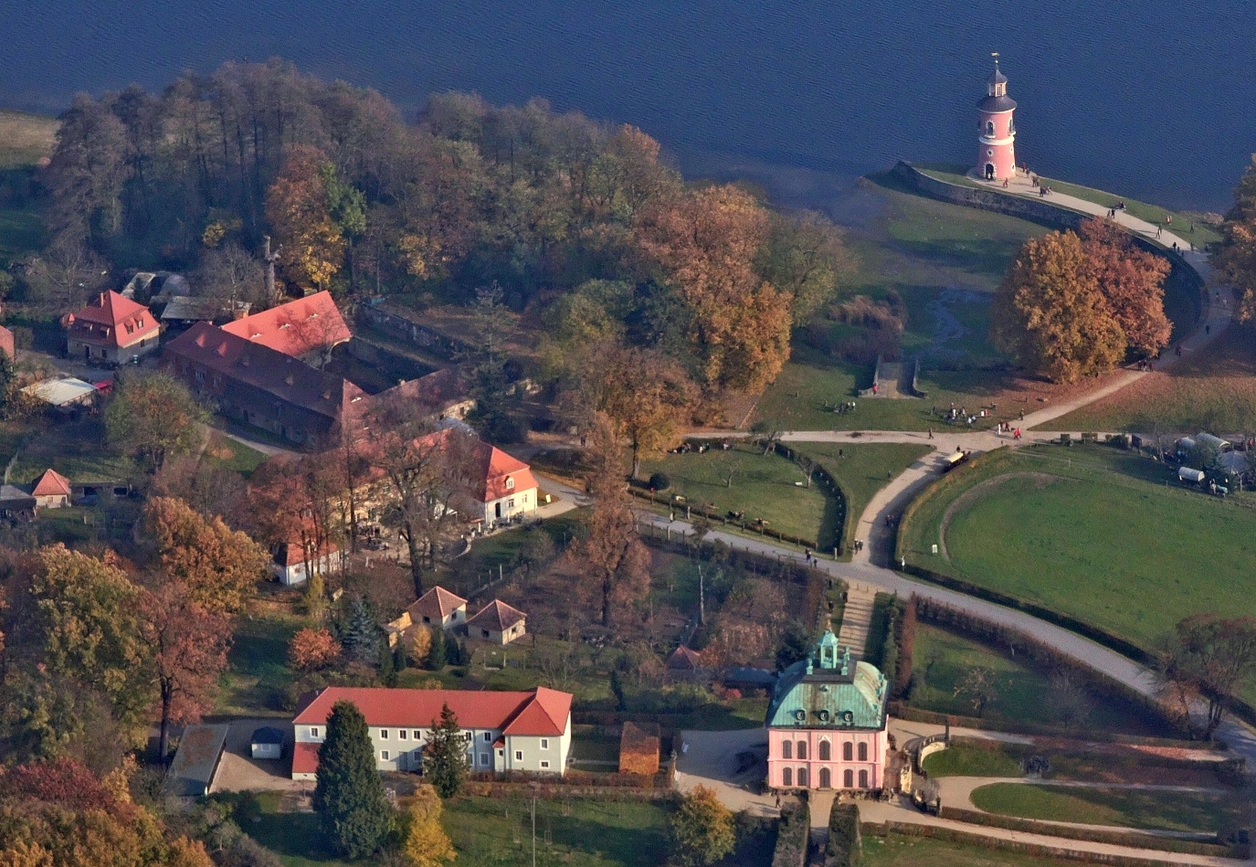 Luftbild vom Fasanenschlösschen Moritzburg (rechts vorn), dem Leuchtturm Moritzburg und dem Marcolinihaus (links hinten)